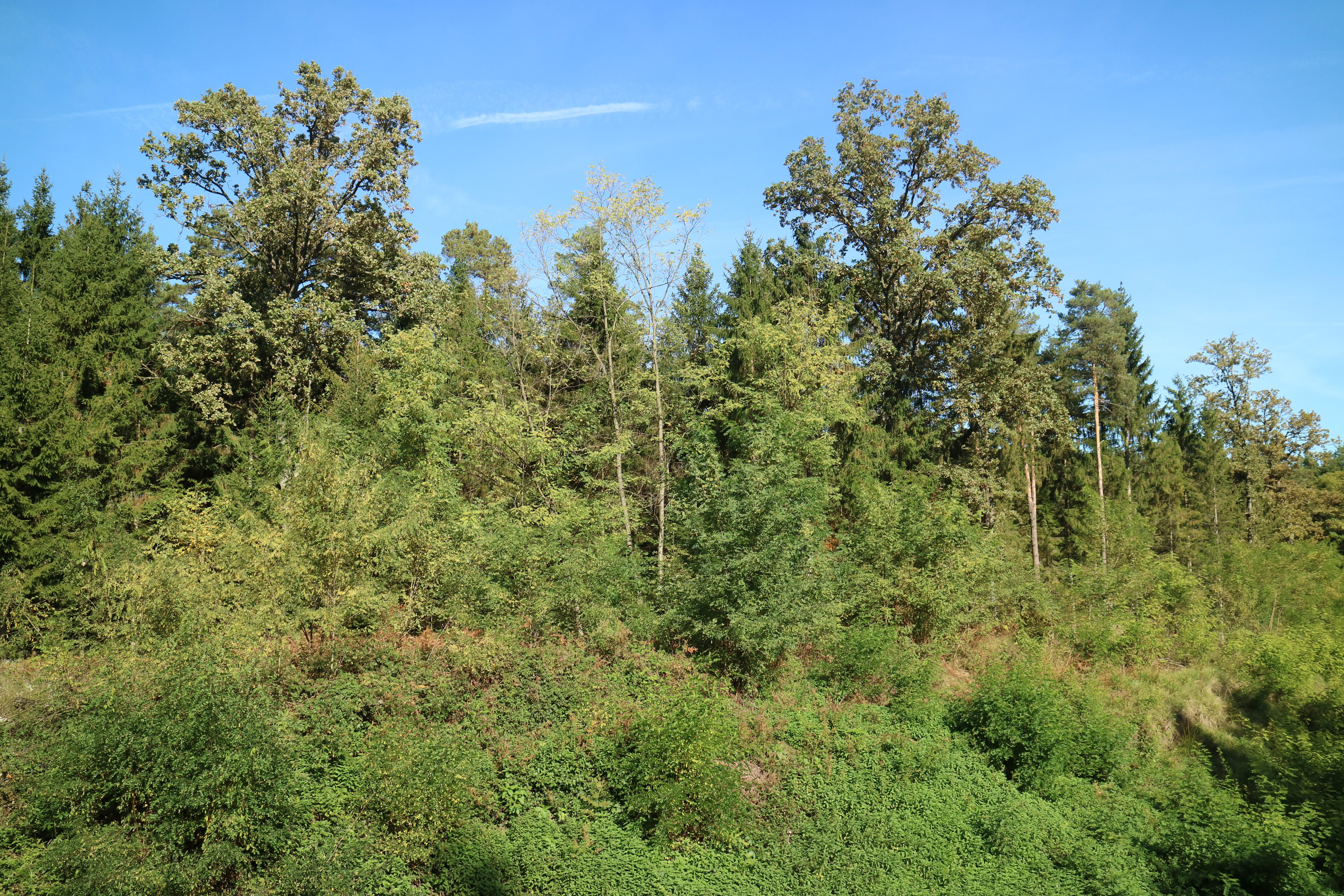 Kaiserwald an der GKB-Trasse (Gemeinde Premstätten)